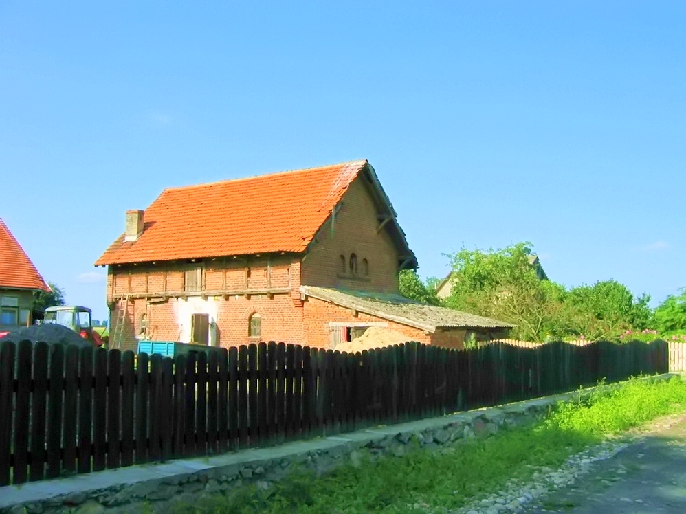 Osina - Kościuszki